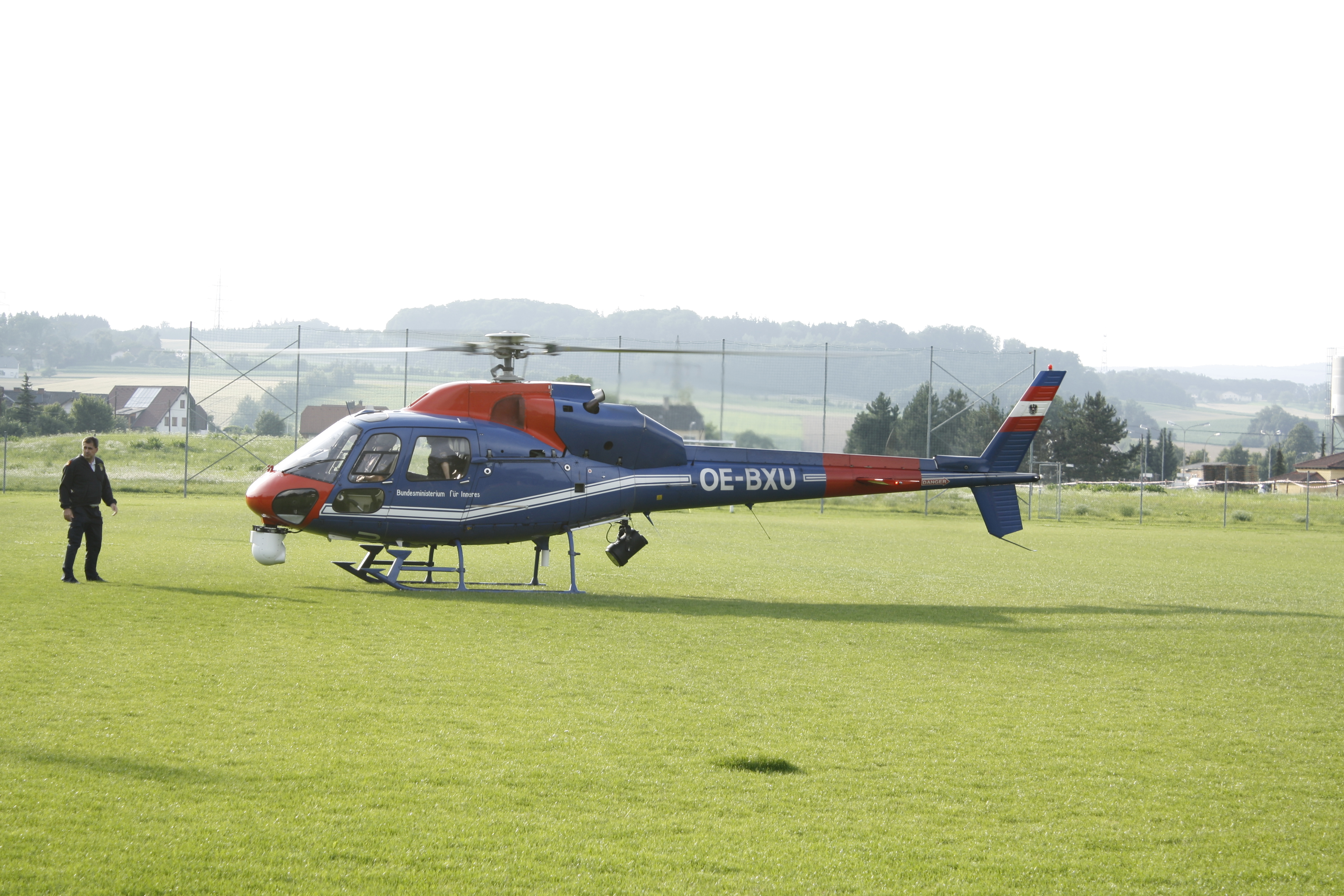 Polizeihubschrauber BEL206 der österreichischen Polizei bei einer Außenlandung in Wieselburg (Niederösterreich)